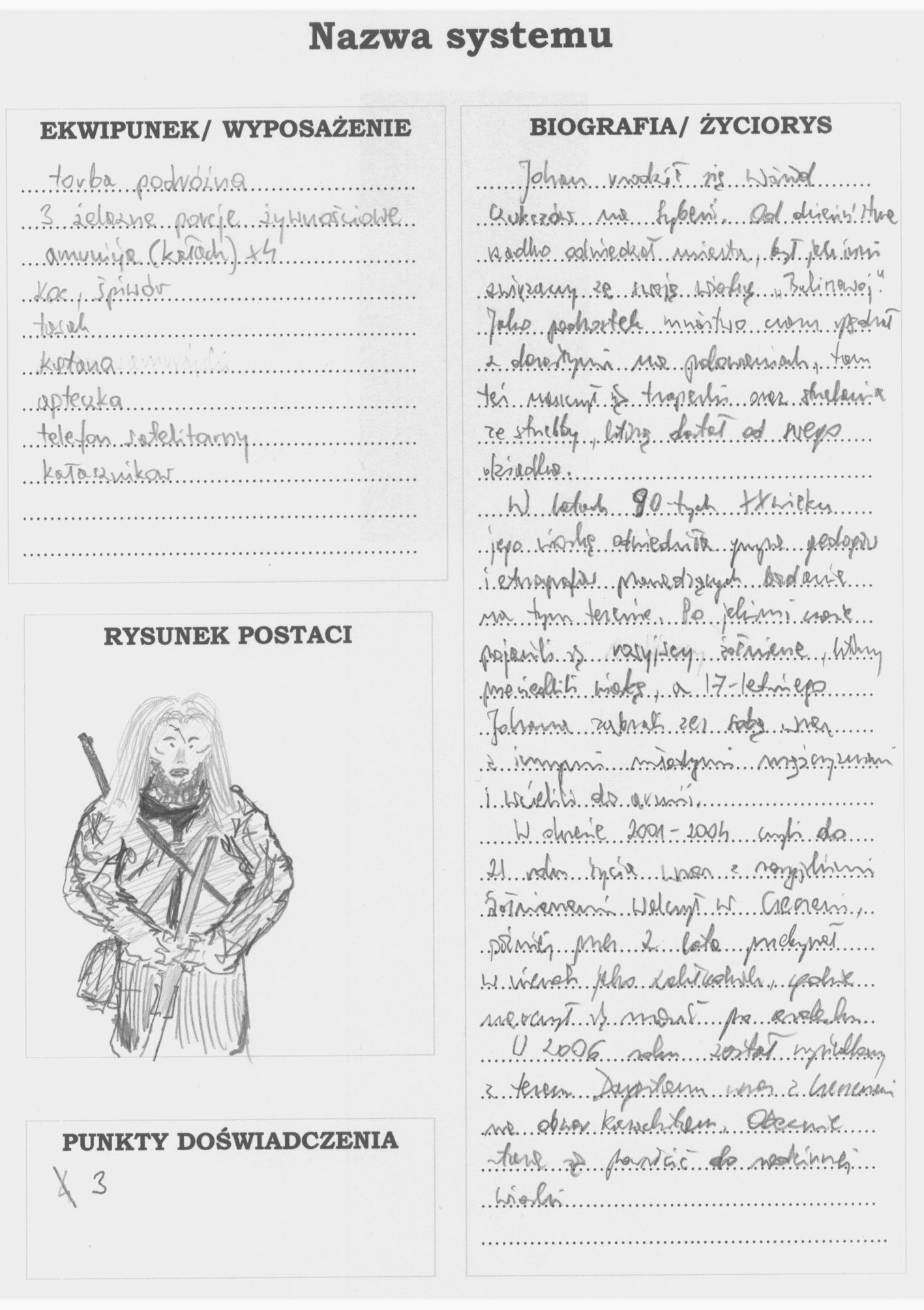 Karta postaci - struktura karty postaci w grach RPG - revers